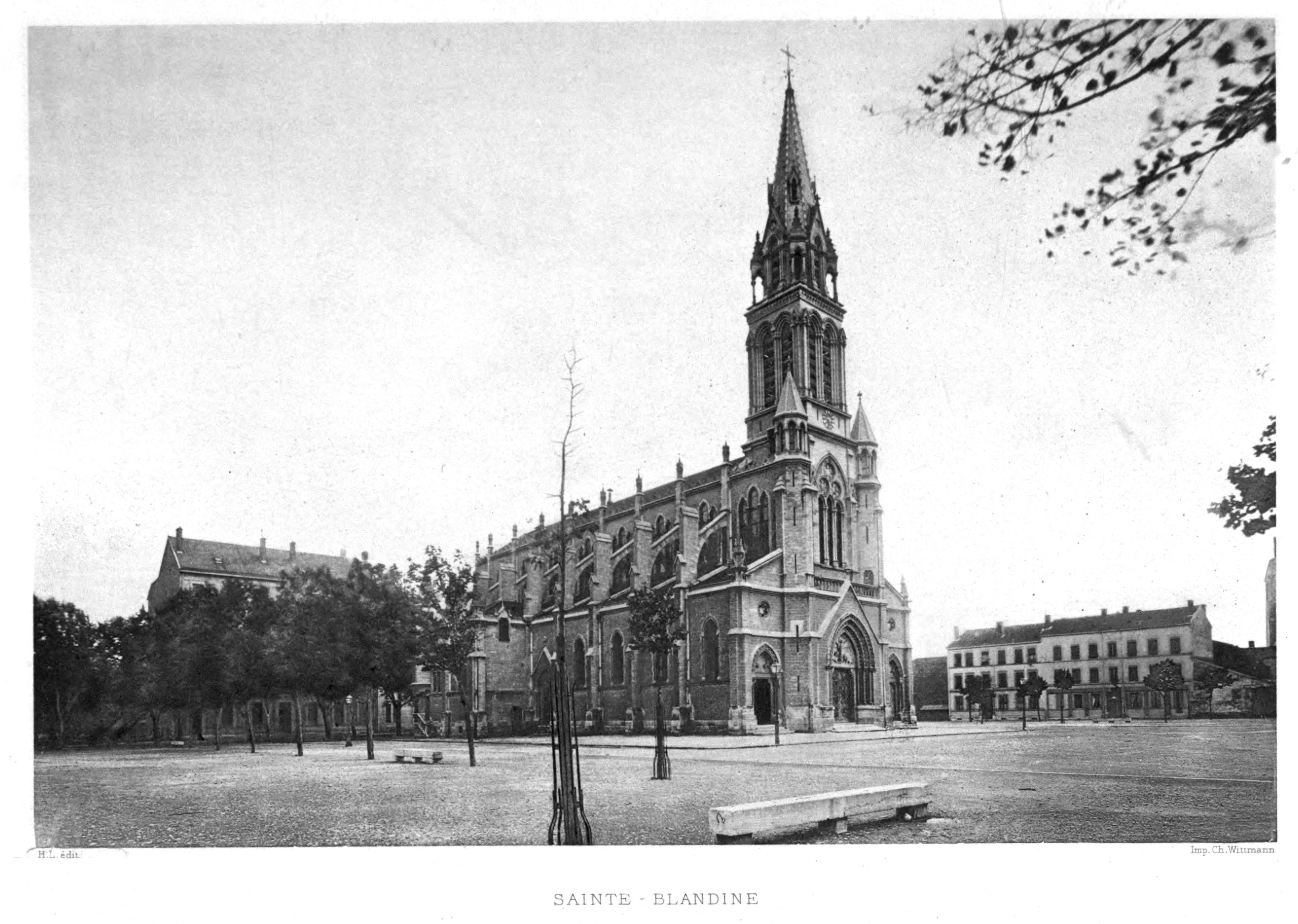 Illustration pour l'Histoire des églises et chapelles de Lyon